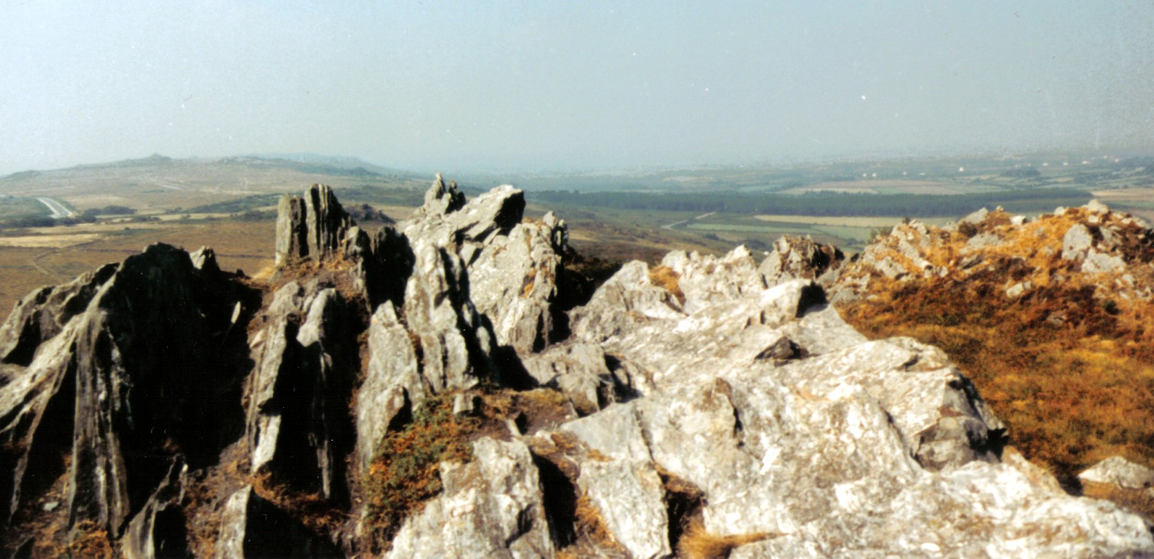 Blick vom Roc Trévezel in der Bretagne